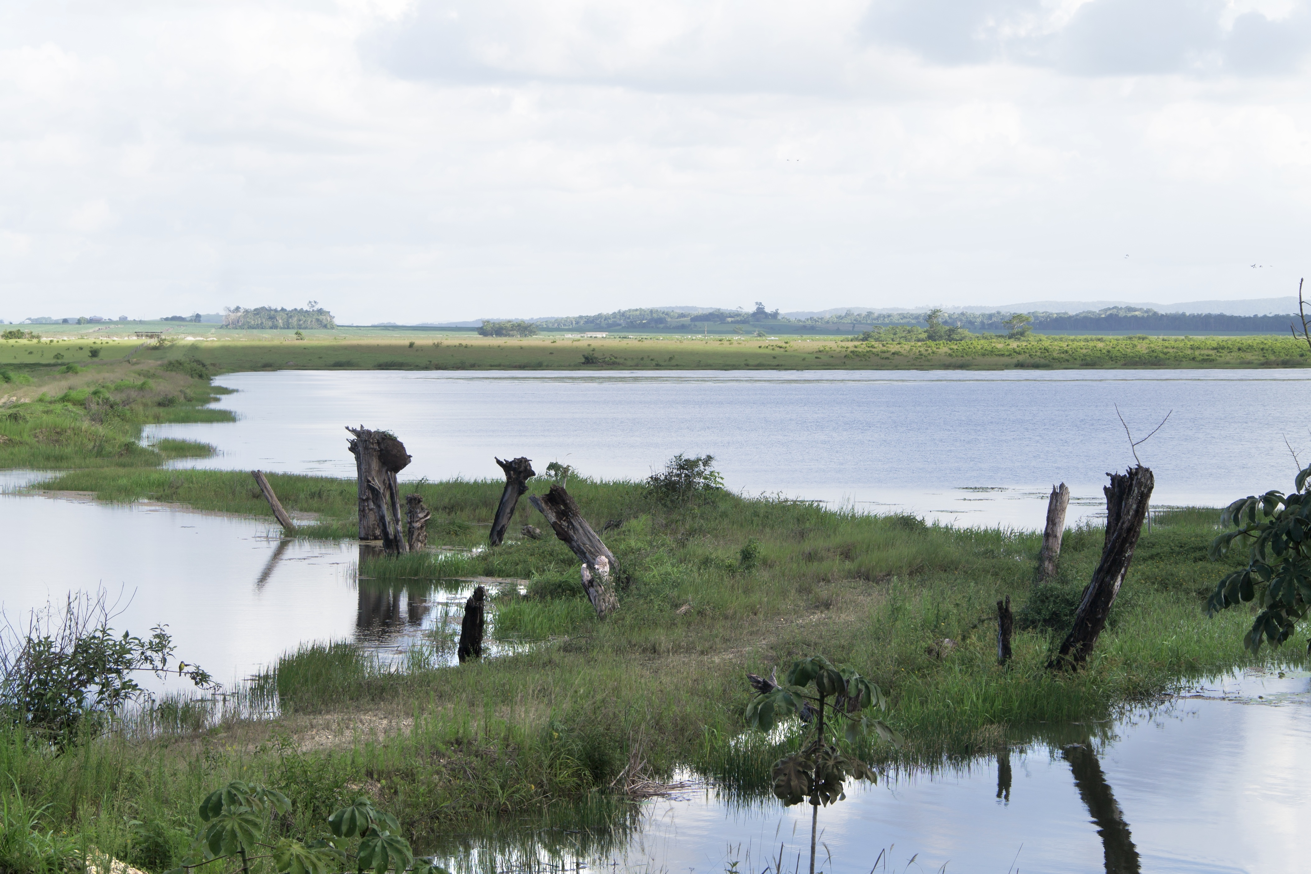 Calm Lake